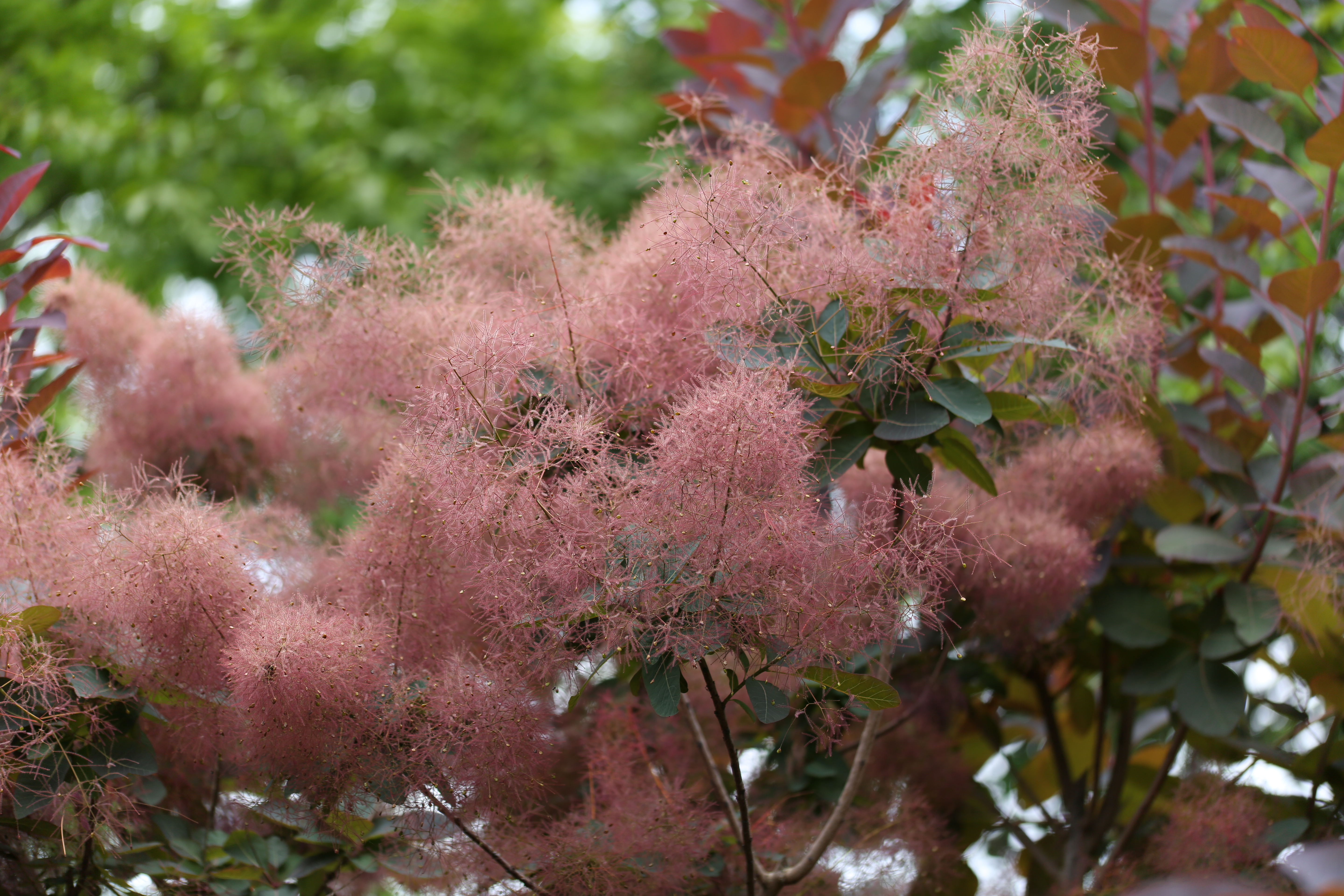 Cotinus coggygria